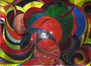 Pedro Coronel Vitral "Vida"